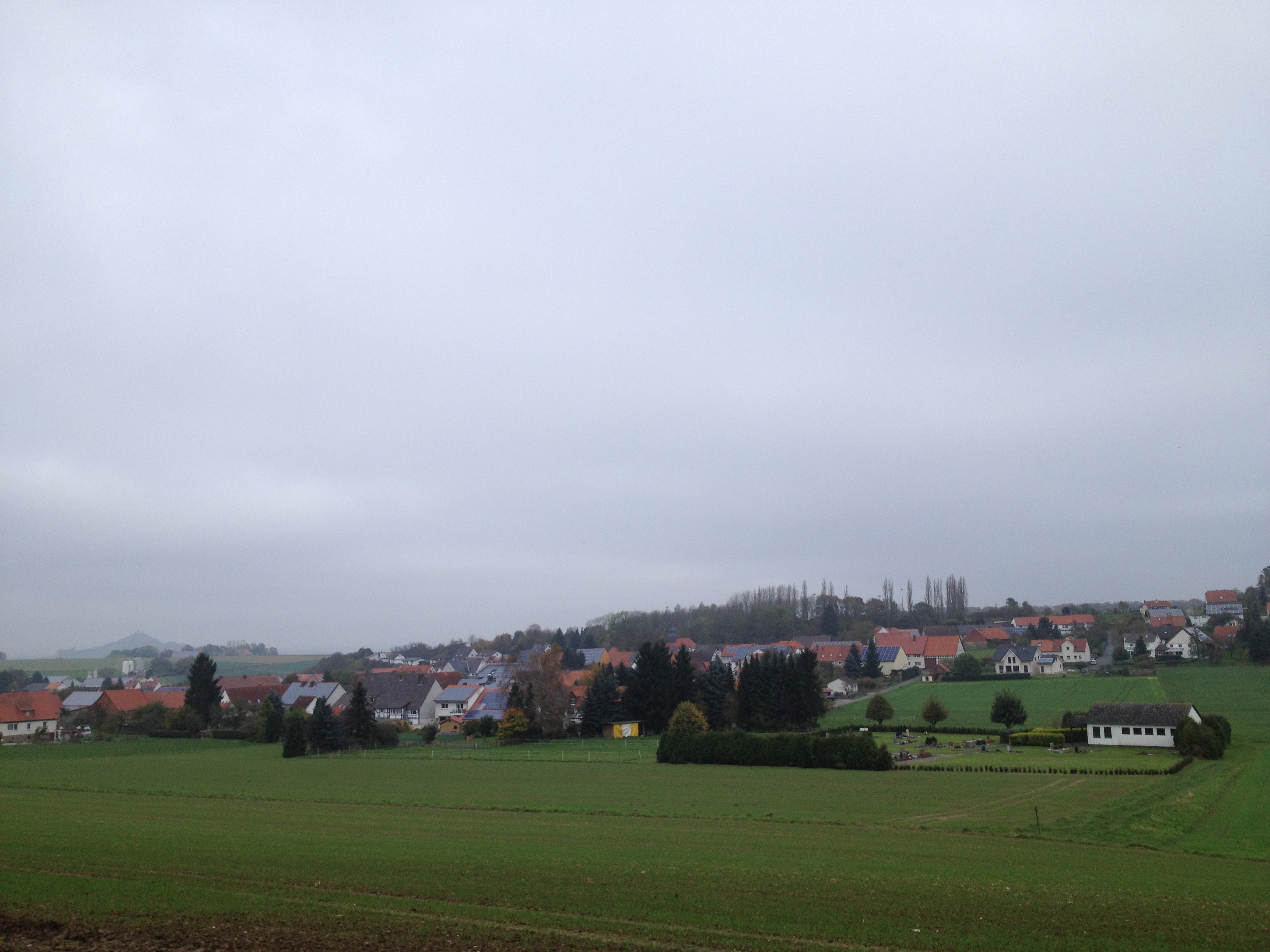 Der Fulda-Diemel-Weg (F) und der Märchenlandweg (M) an der Schutzhütte Desenbergblick südlich von Ersen am Waldrand des Waldgebietes Wolfsloh mit Blick auf Ersen, einen Ortsteil von Liebenau (Hessen)